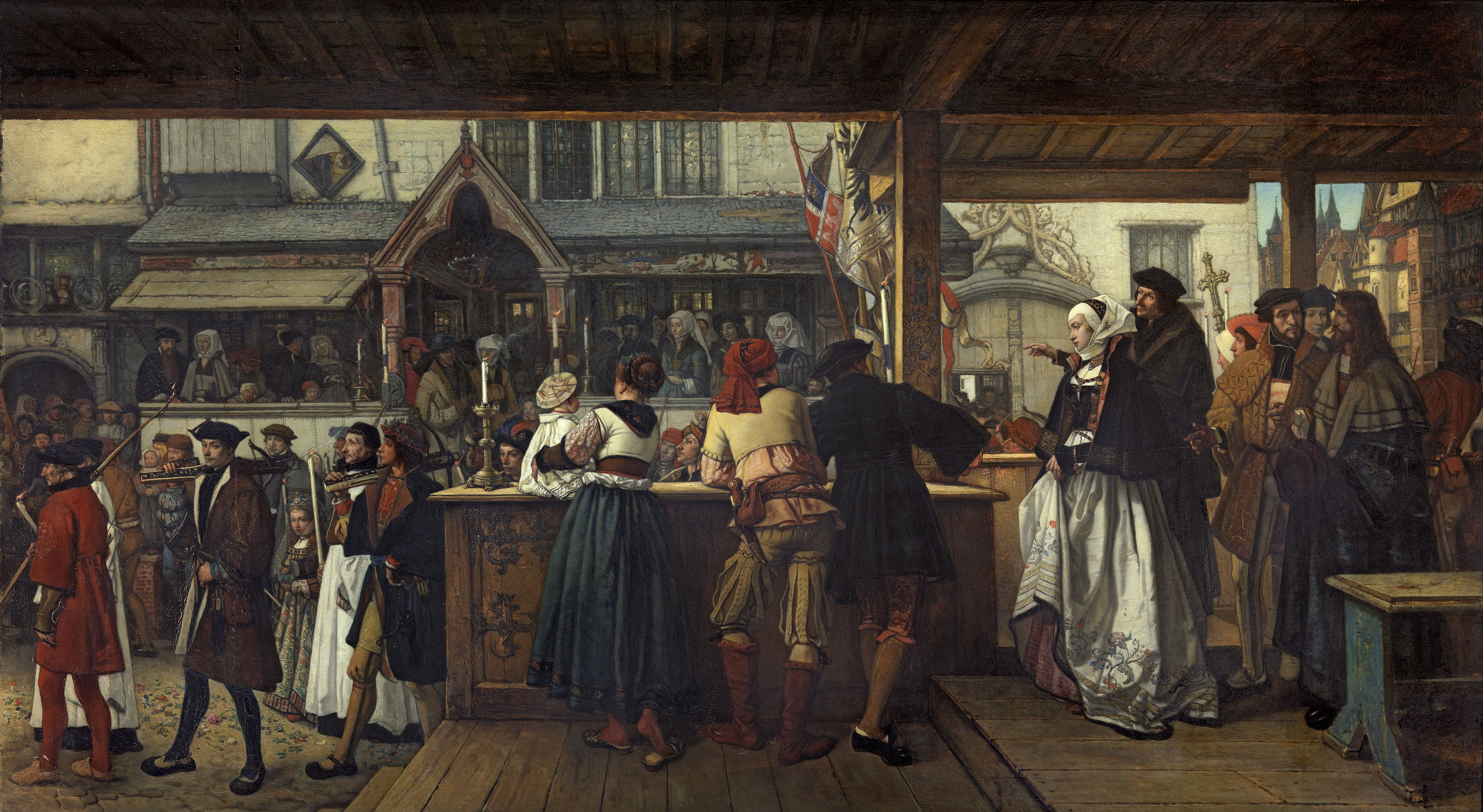 schilderij ( Henri Leys( koninklijk museum voor schone kunsten antwerpen